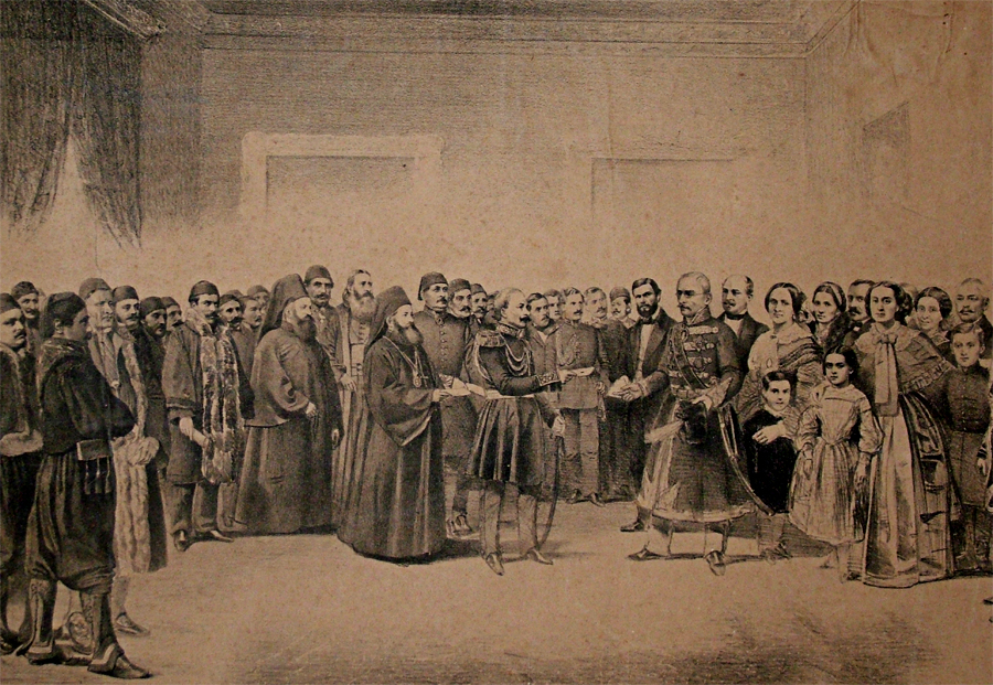 Bukurest, 3.jan 1859. Stanojlo Petrović је nekadašnjem i budućem knezu Milošu uručio pismo Narodne Skupštine